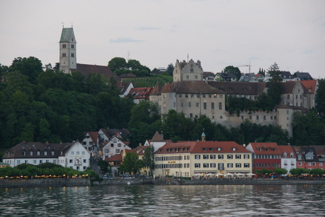 Altstadt, Meersburg